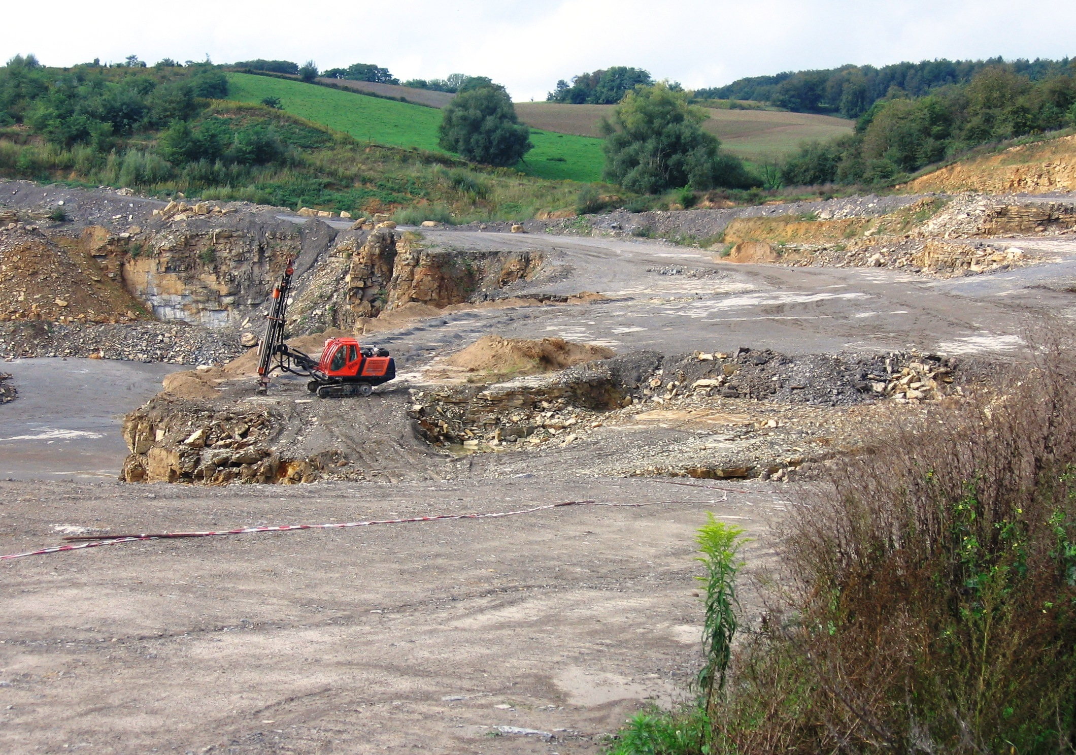 Muschelkalksteinbruch der Firma HeidelbergCement auf der Gemarkung Nußloch